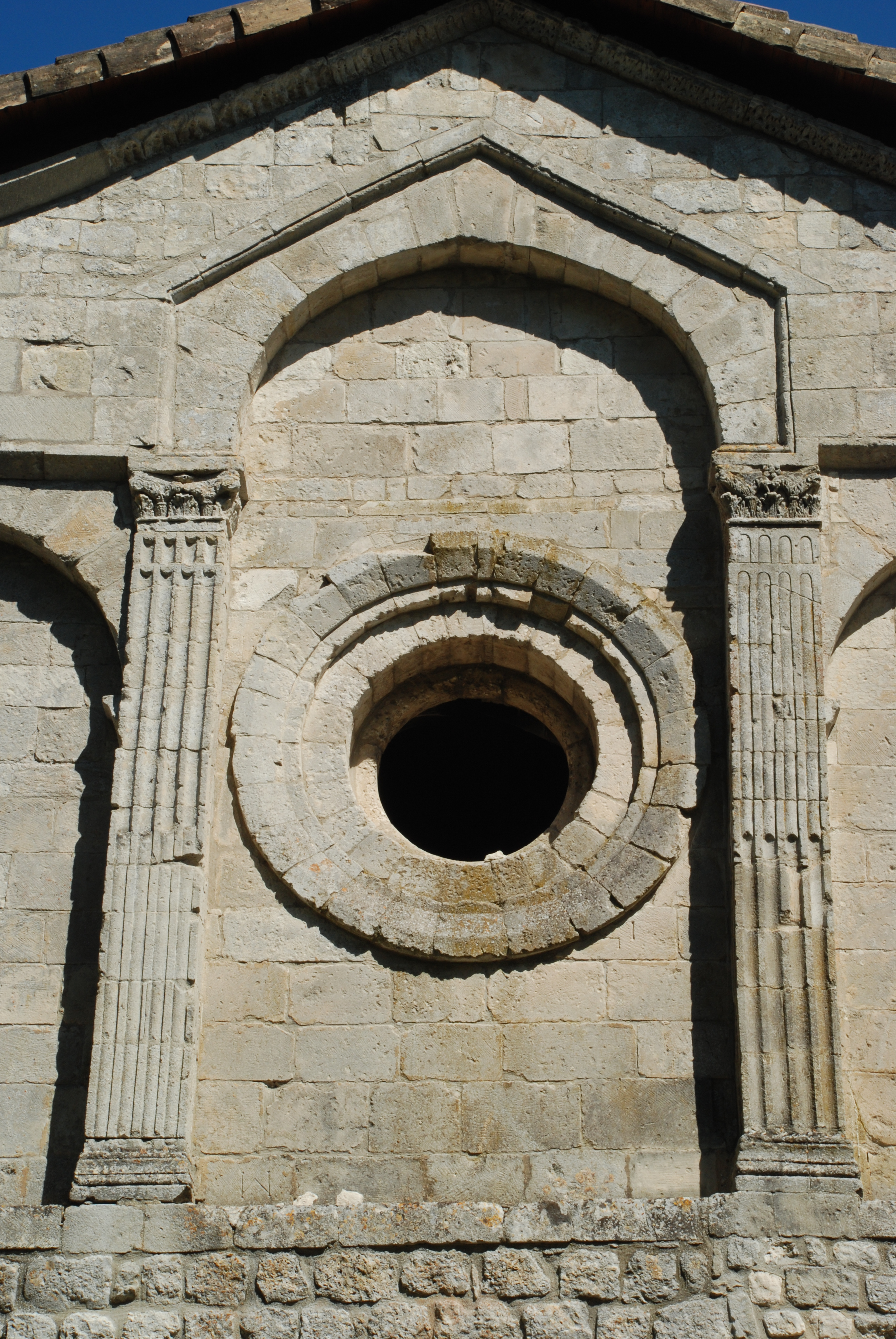 France - Drôme - Tricastin - Prieuré du Val des Nymphes - art roman provençal inspiré de l'antique - arc en mitre - triplet